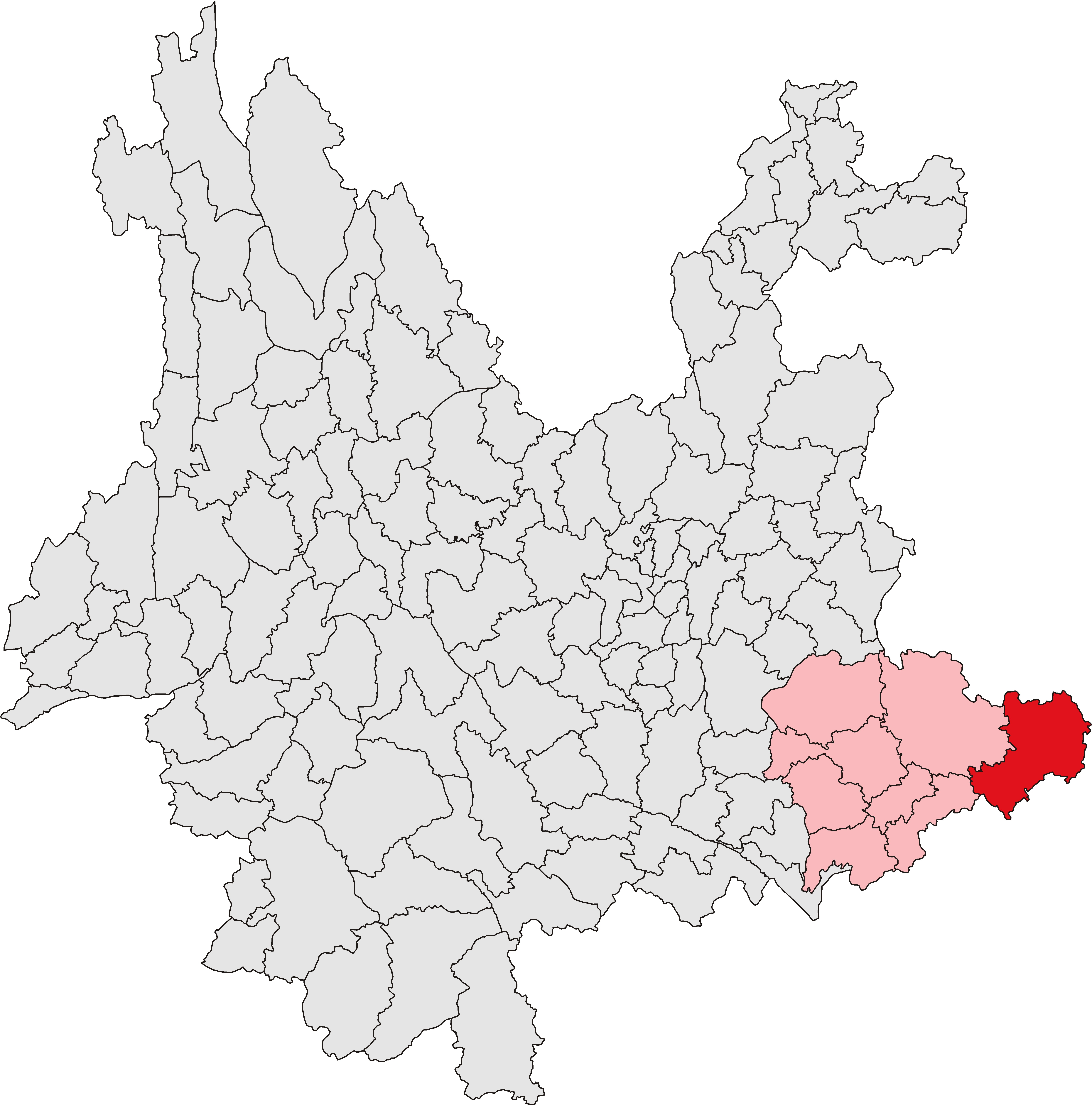 中文（中国大陆）: 富宁县位置图